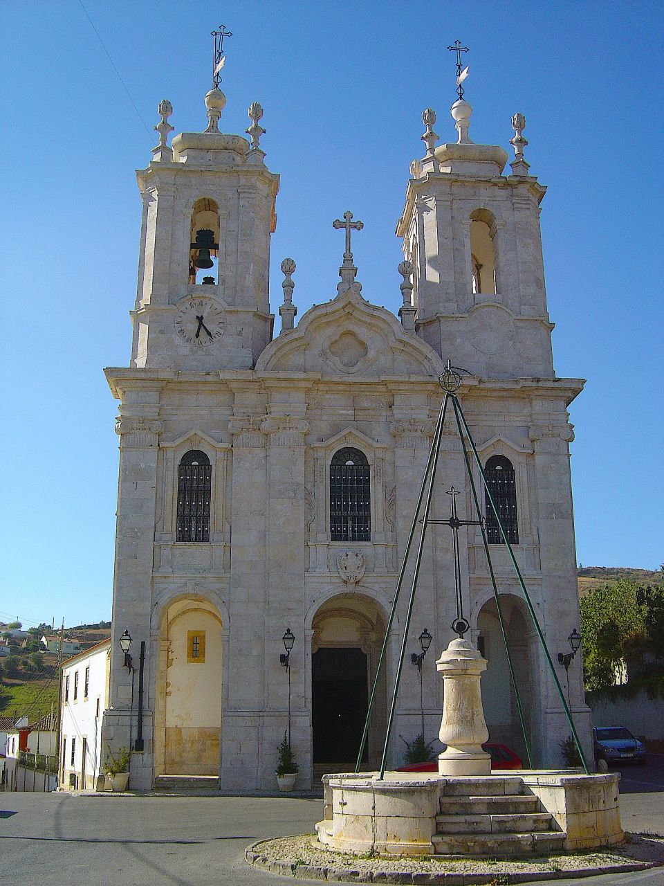 Meca - Alenquer